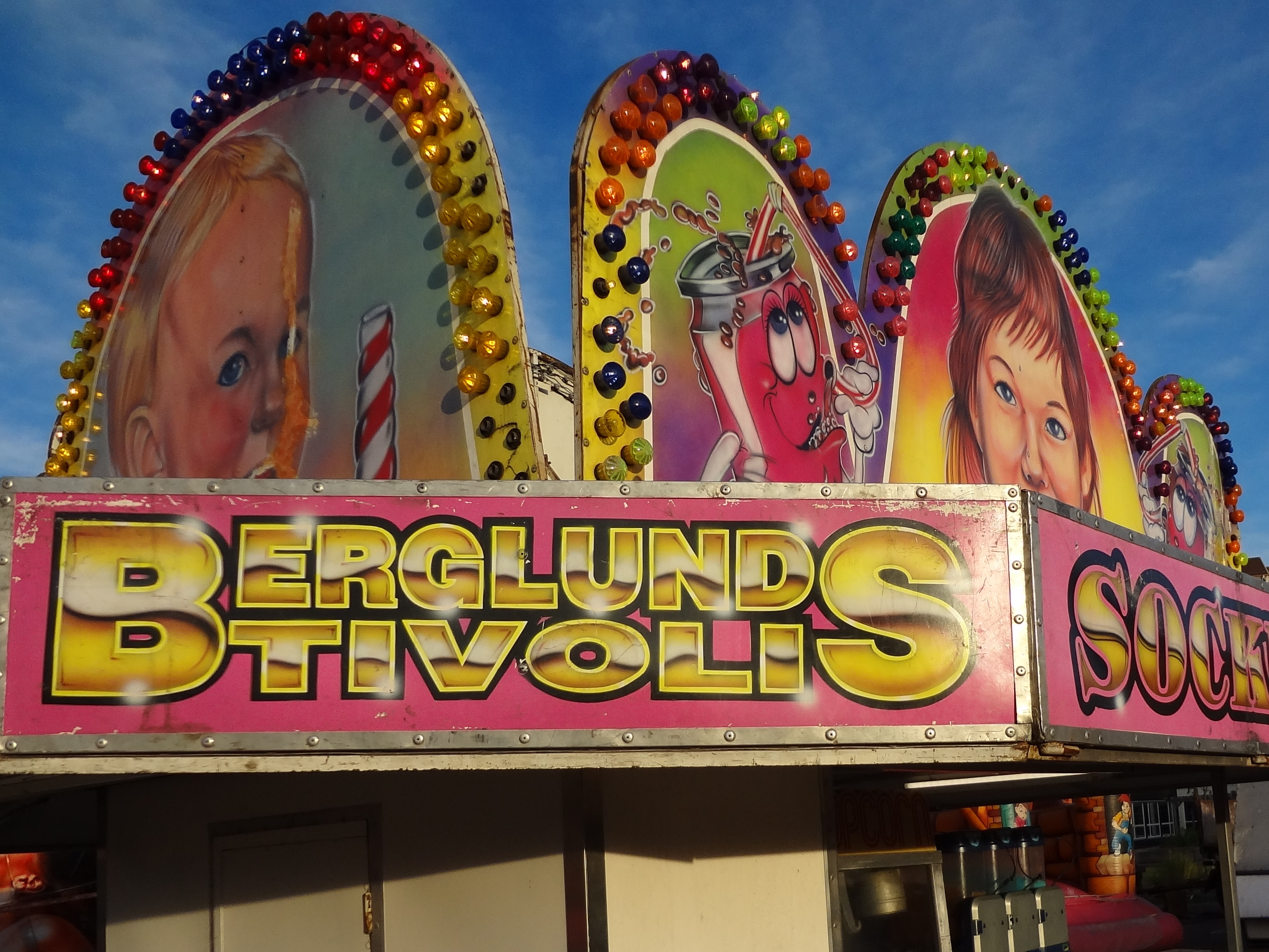 Berglunds tivoli i Eskilstuna, september 2012.